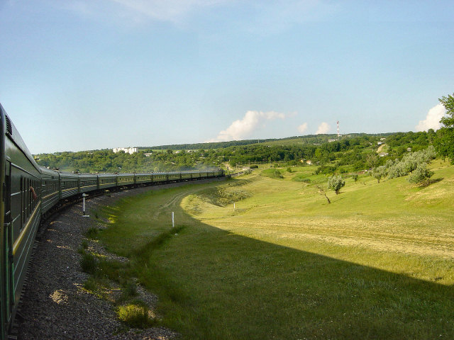 Landschap ten westen van Chisinau, met de dagelijkse trein 341 uit Moskou. Eigen foto Mark Voorendt, juli 2005. Categorie:Afbeelding trein